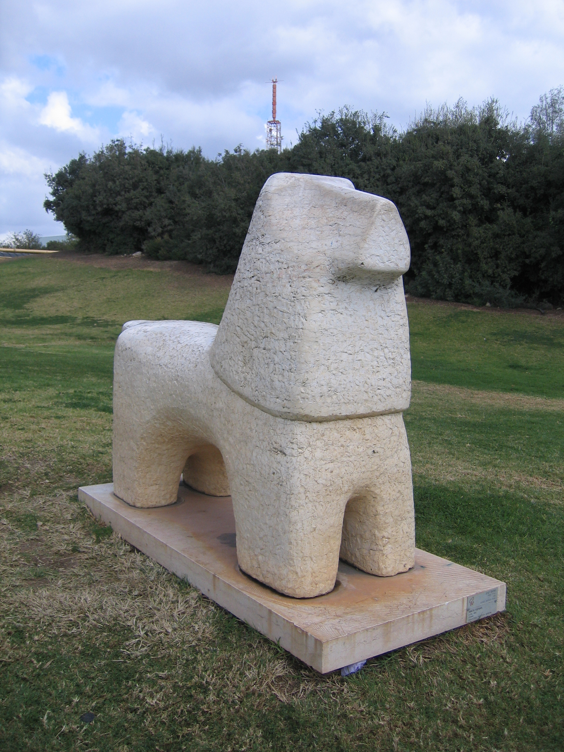 Lion (1993) by Amos kenan, 55/185/140 cm, stone. עמוס קינן, אריה (1993), 55/185/140 ס"מ.